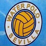 Logotipo de Club Waterpolo Sevilla